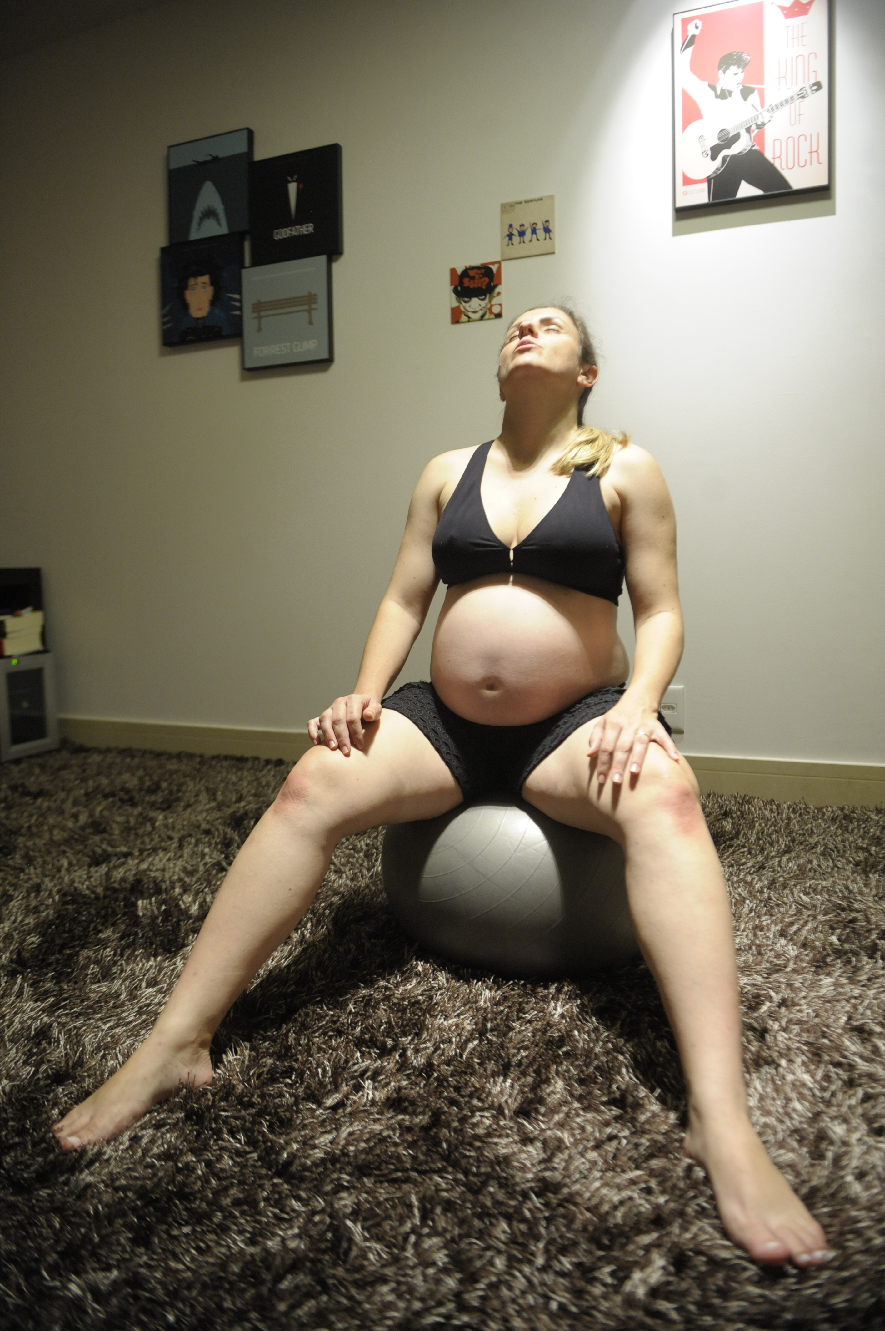 Doulas oferecem orientação, suporte físico e emocional à família na gravidez e no parto. A doula Jéssica Macêdo orienta Luciana Rodovalho sobre posições, exercícios e cuidados que ajudam a gestante a se sentir mais confortável no final da gravidez e aliviam as dores no trabalho de parto, como banho, posição de "cavalinho" e apoio de bola. Foto: Jefferson Rudy/Agência Senado